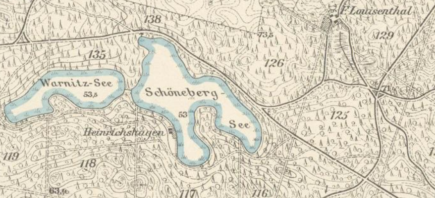 Heinrichshagen (abgeg. 1958/59), Warnitzsee und Schönebergsee, Gemarkung Steinhöfel, Stadt Angermünde, Lkr. Uckermark, Brandenburg, Ausschnitt aus dem Messtischblatt Nr.2949 Greiffenberg von 1890